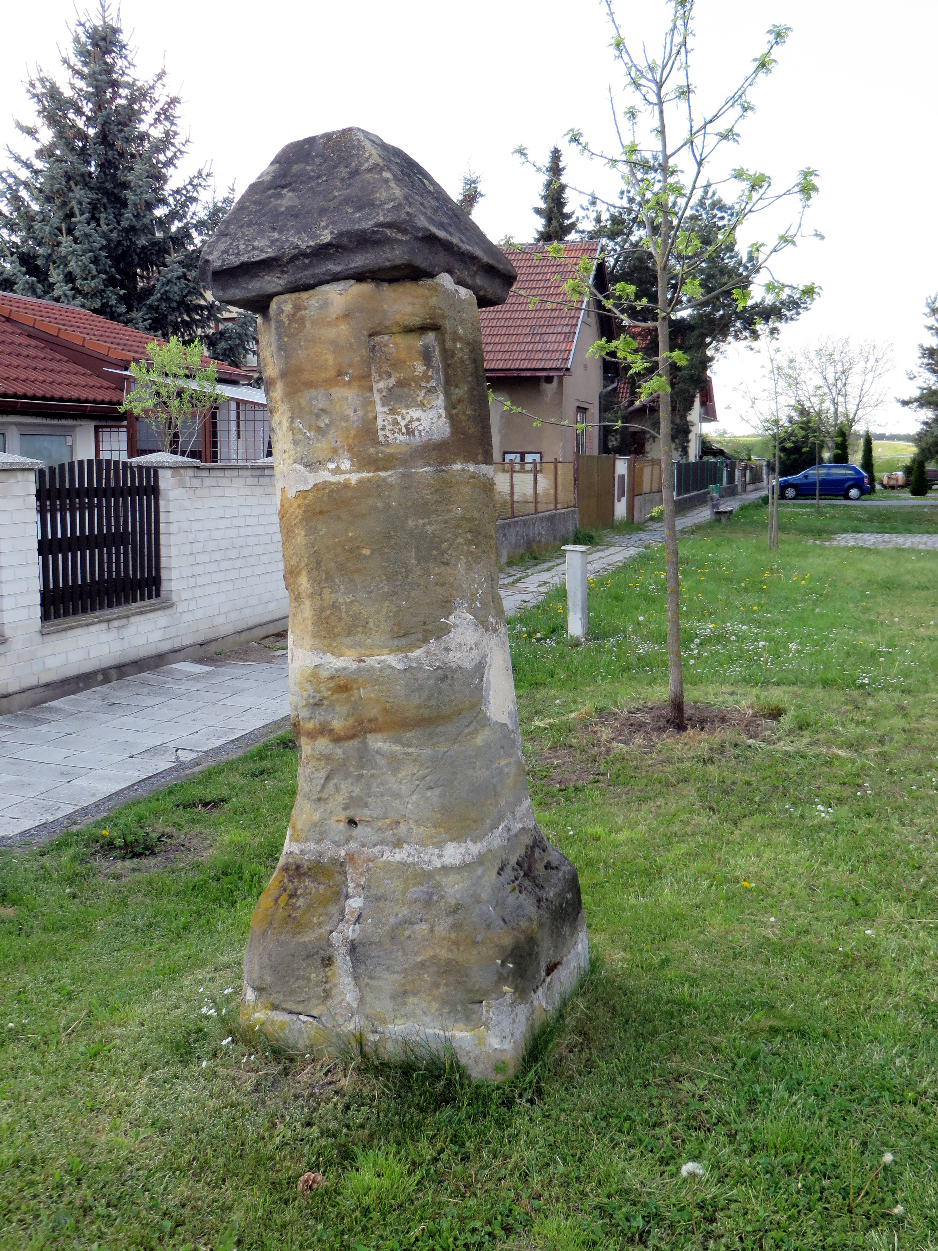 Boží muka (Velké Zboží), proti hřbitovu, Velké Zboží